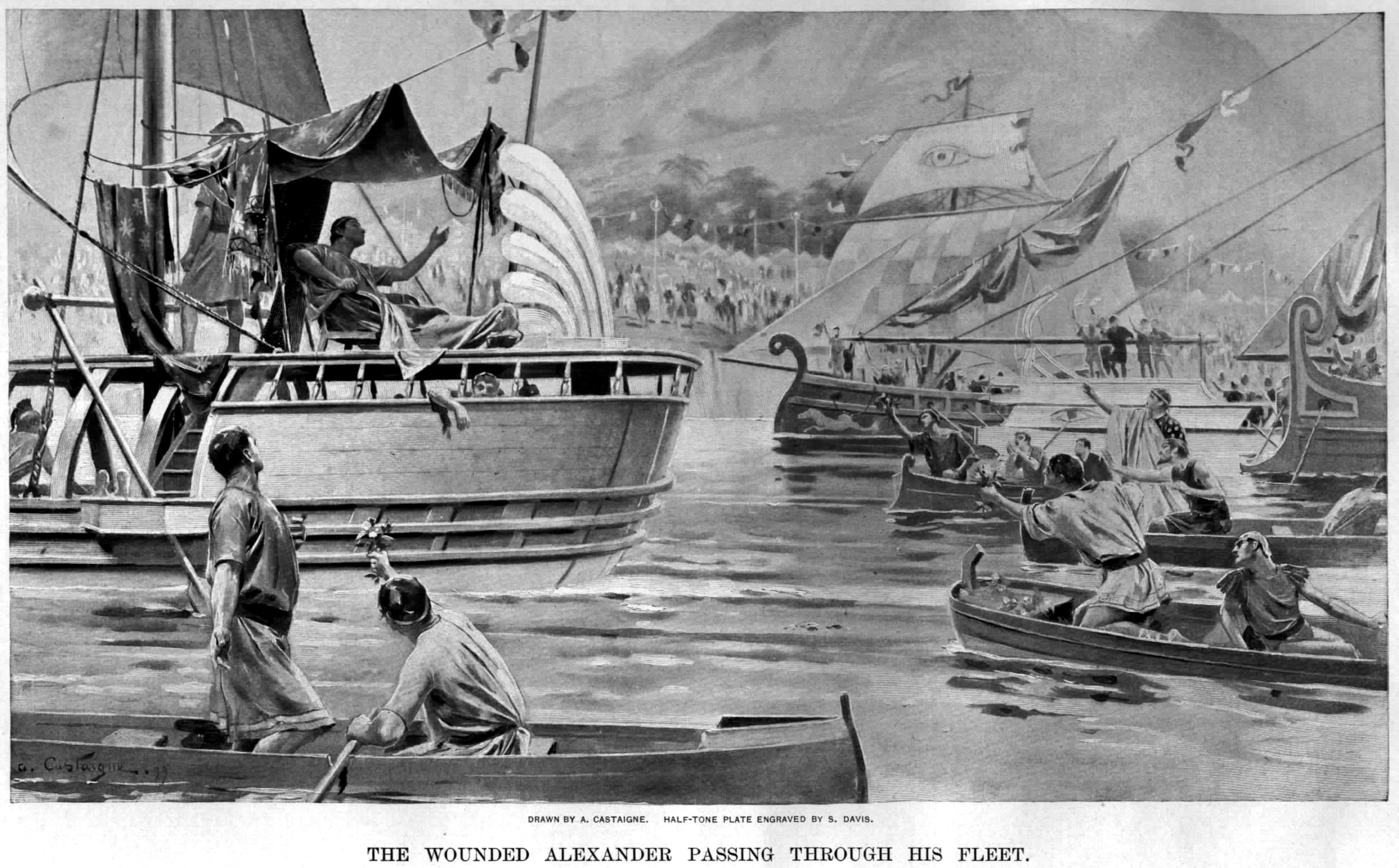 Alexander old drawings